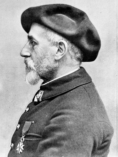 Henri Duhamel, alpiniste